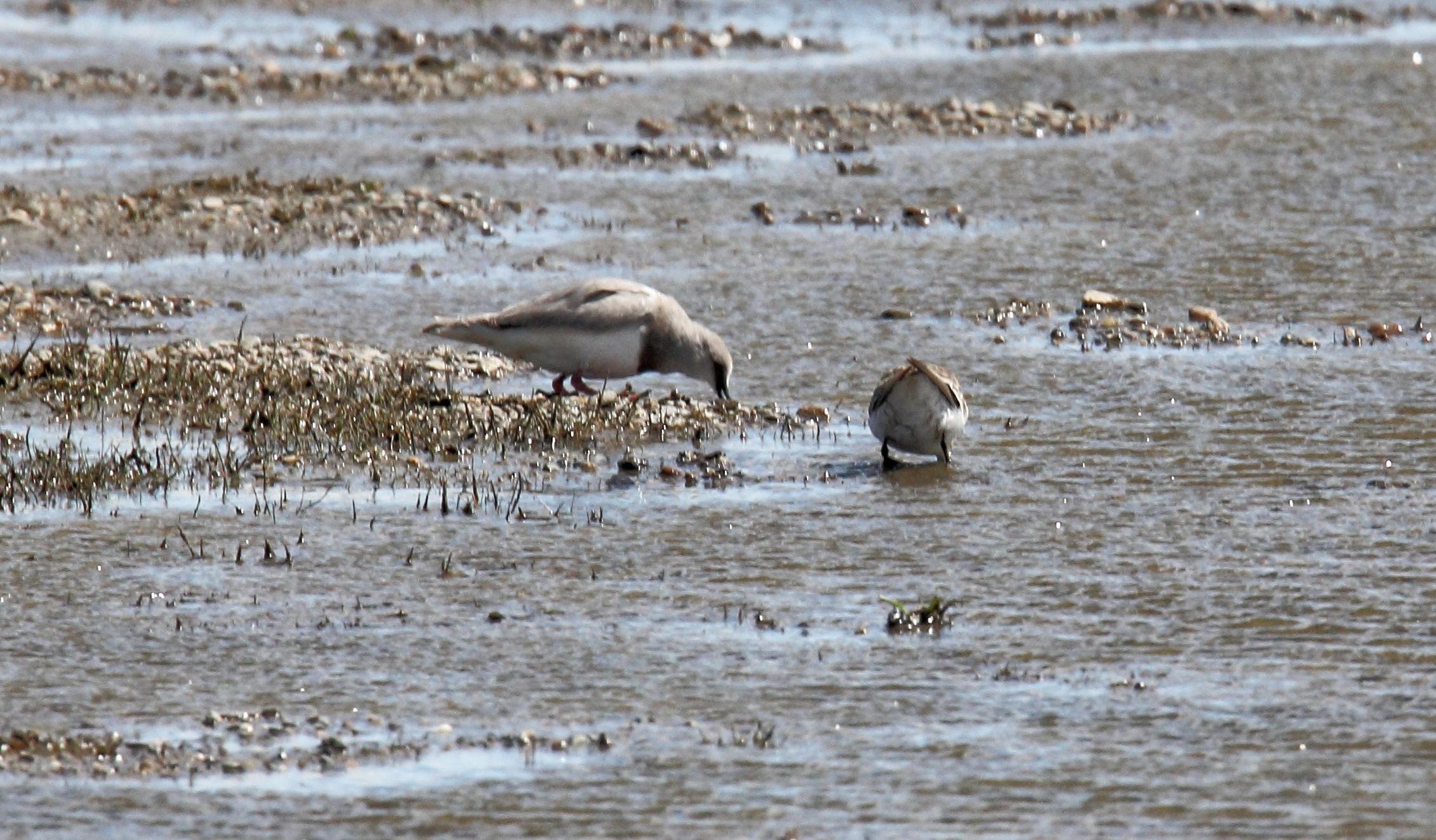 Magellanic plover (Pluvianellus socialis)